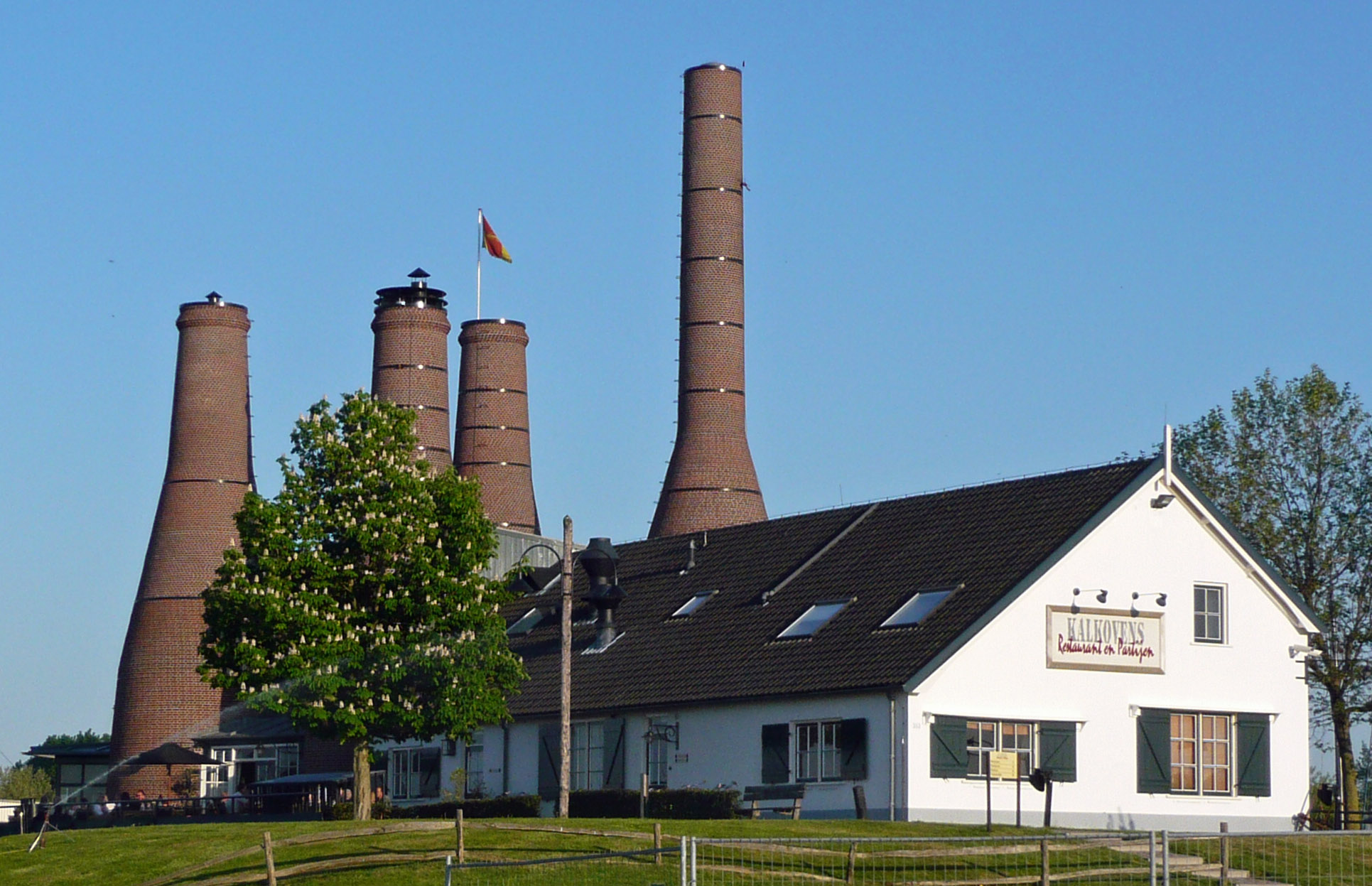 Lime kilns, Huizen, Netherlands, industrial heritage